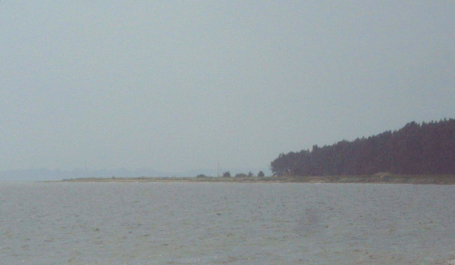 Palmer Ort, Südspitze der Insel Rügen, Deutschland, Blick vom Grabower Strand